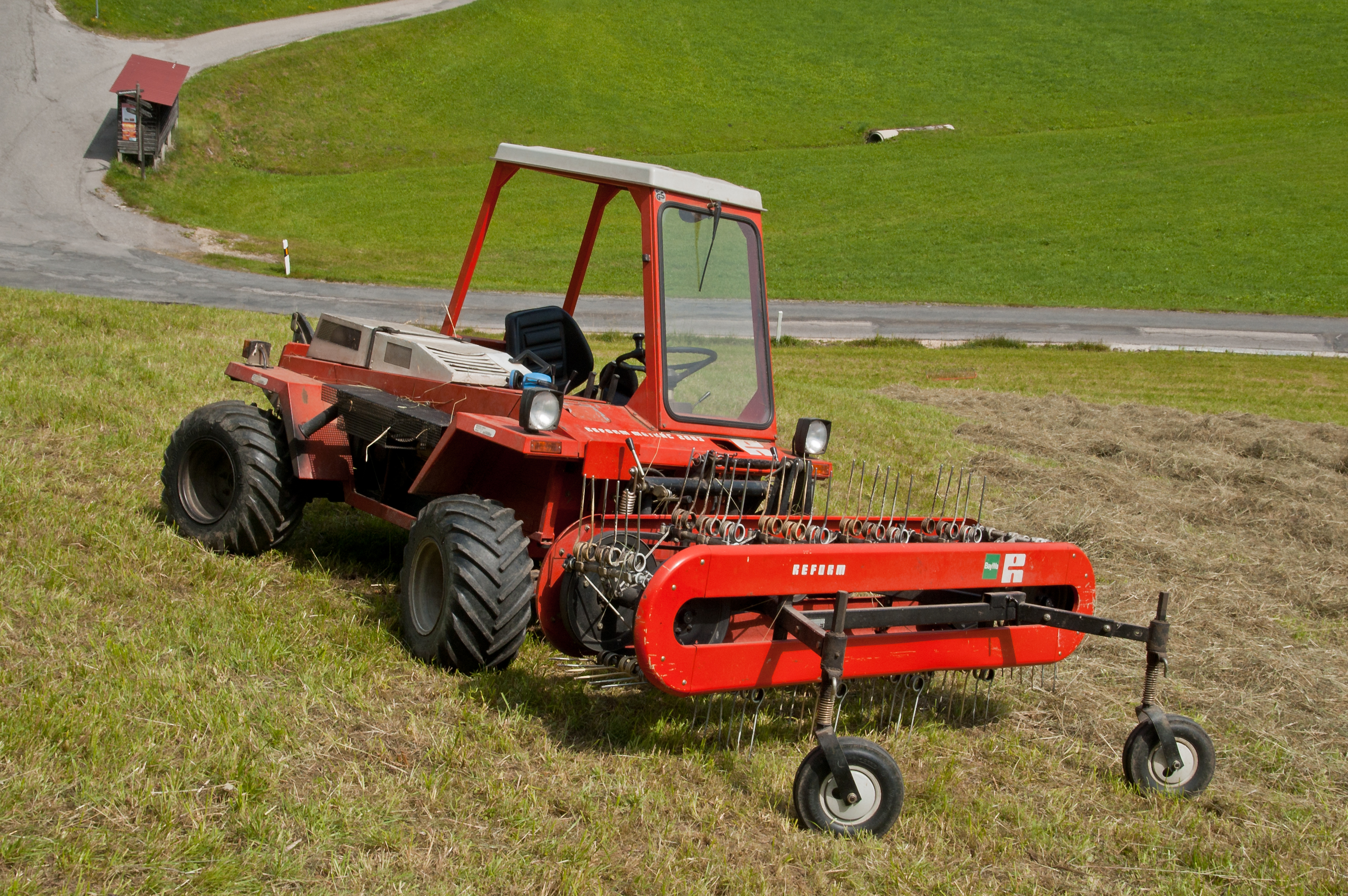 Reform Metrac 2003 mit Bandrechen bei der Heuernte im Berchtesgadener Land